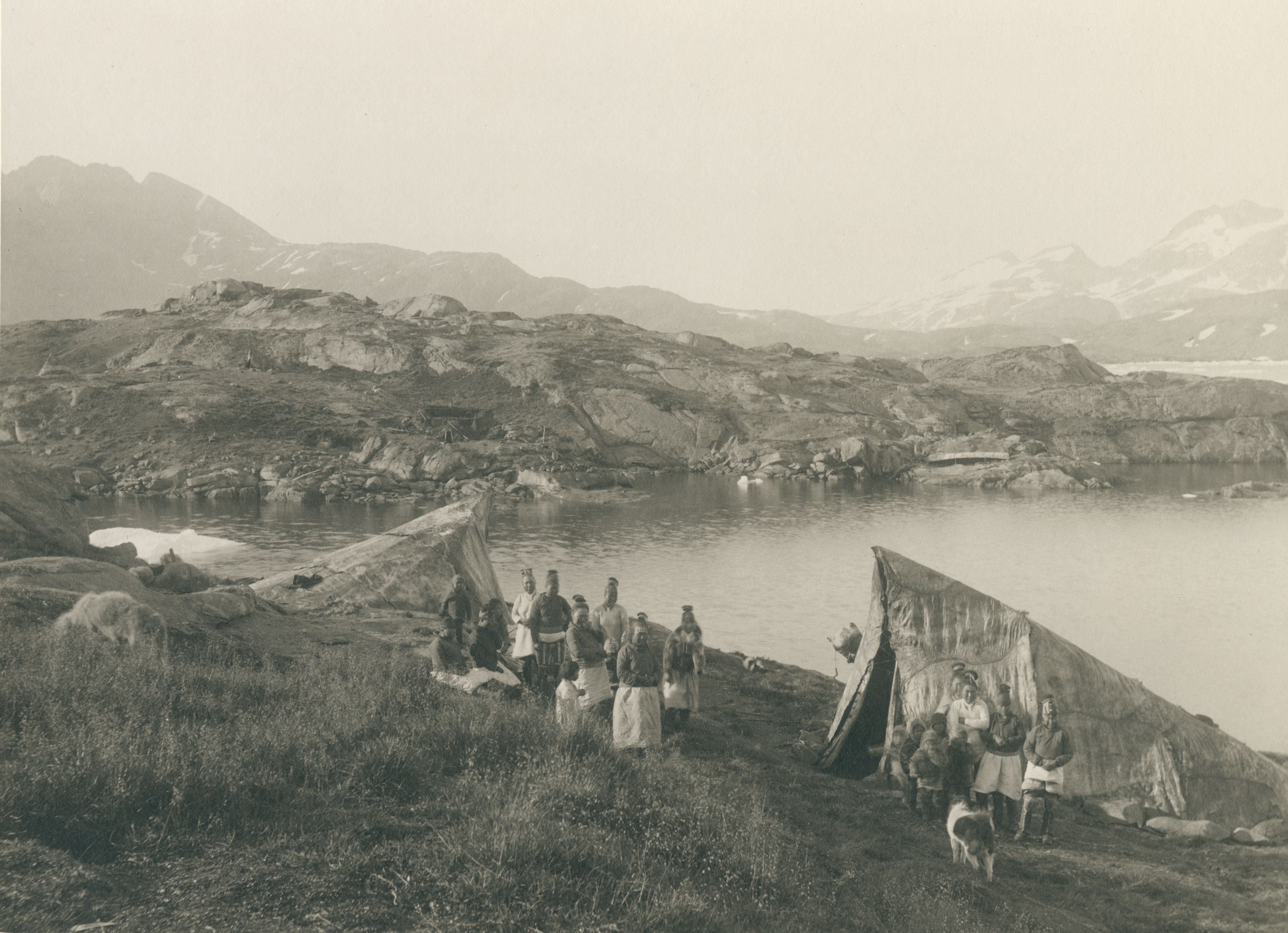 Summer tents at Ammassalik.